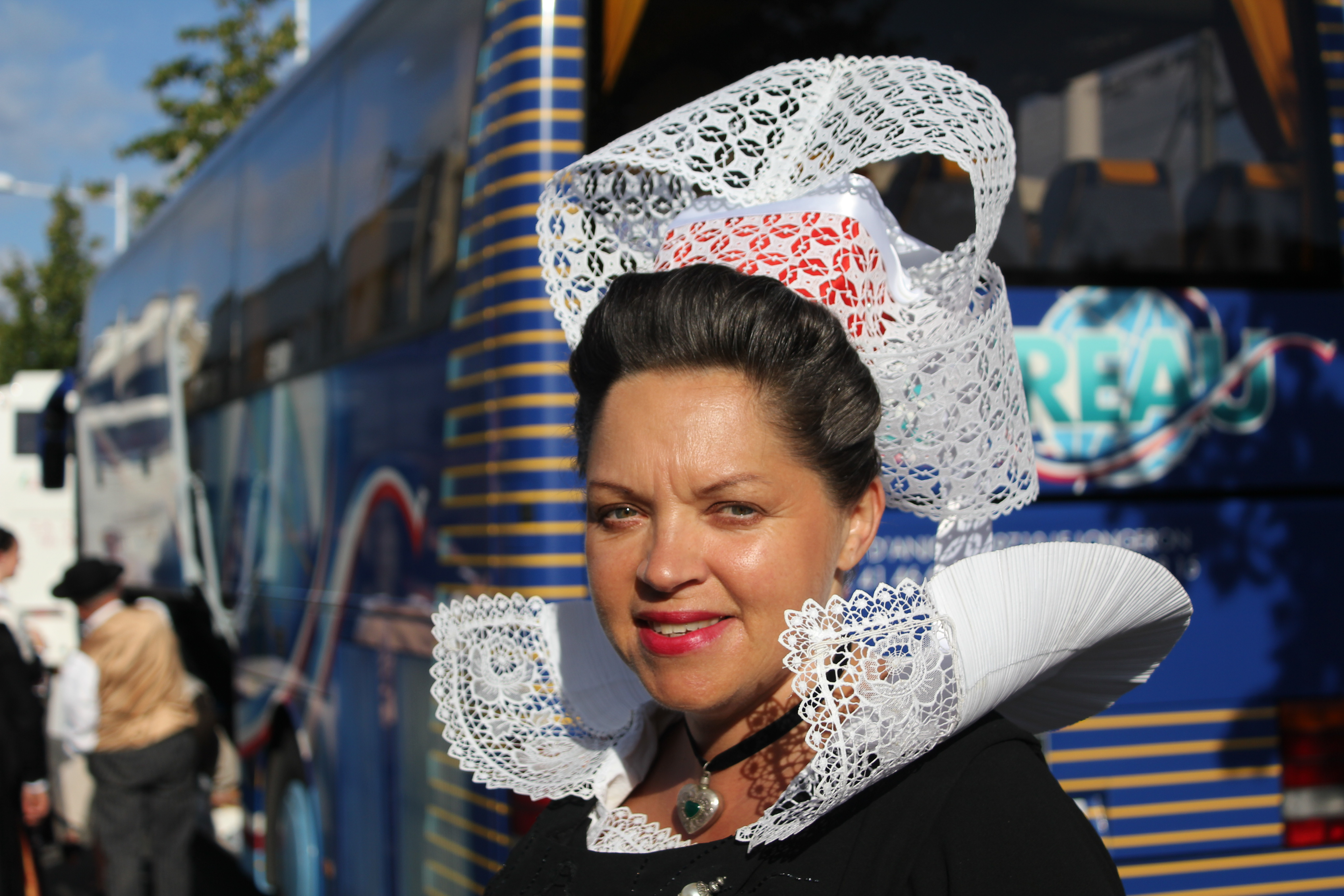 La Giz Foen, coiffe bretonne de la région de Fouesnant, prise pendant le festival interceltique de Lorient 2011